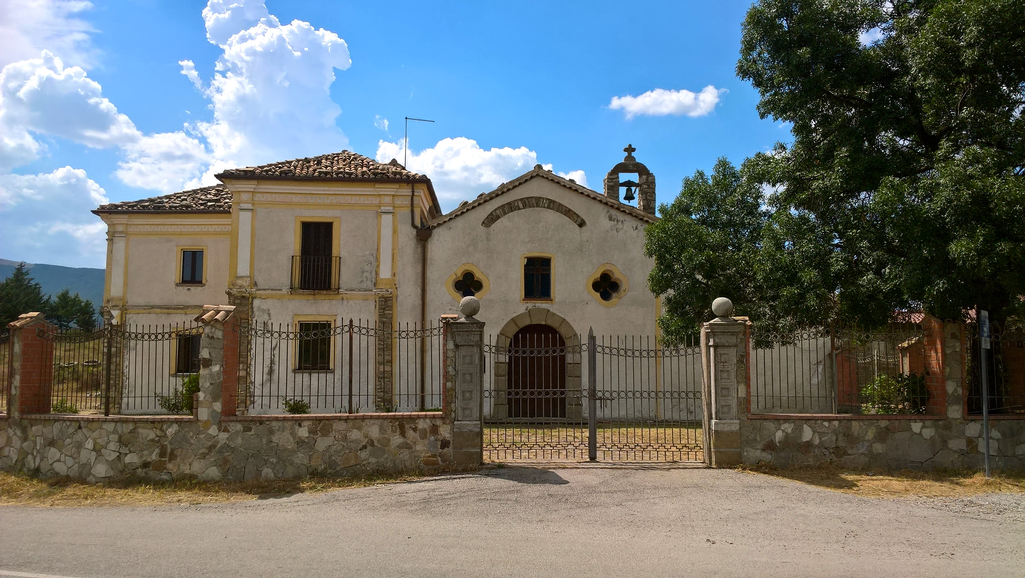 Santuario Maria SS.ma del Monte Saraceno